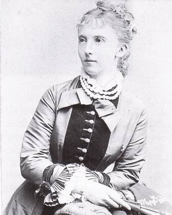 Portret van Maria van Pruisen, anno 1878.